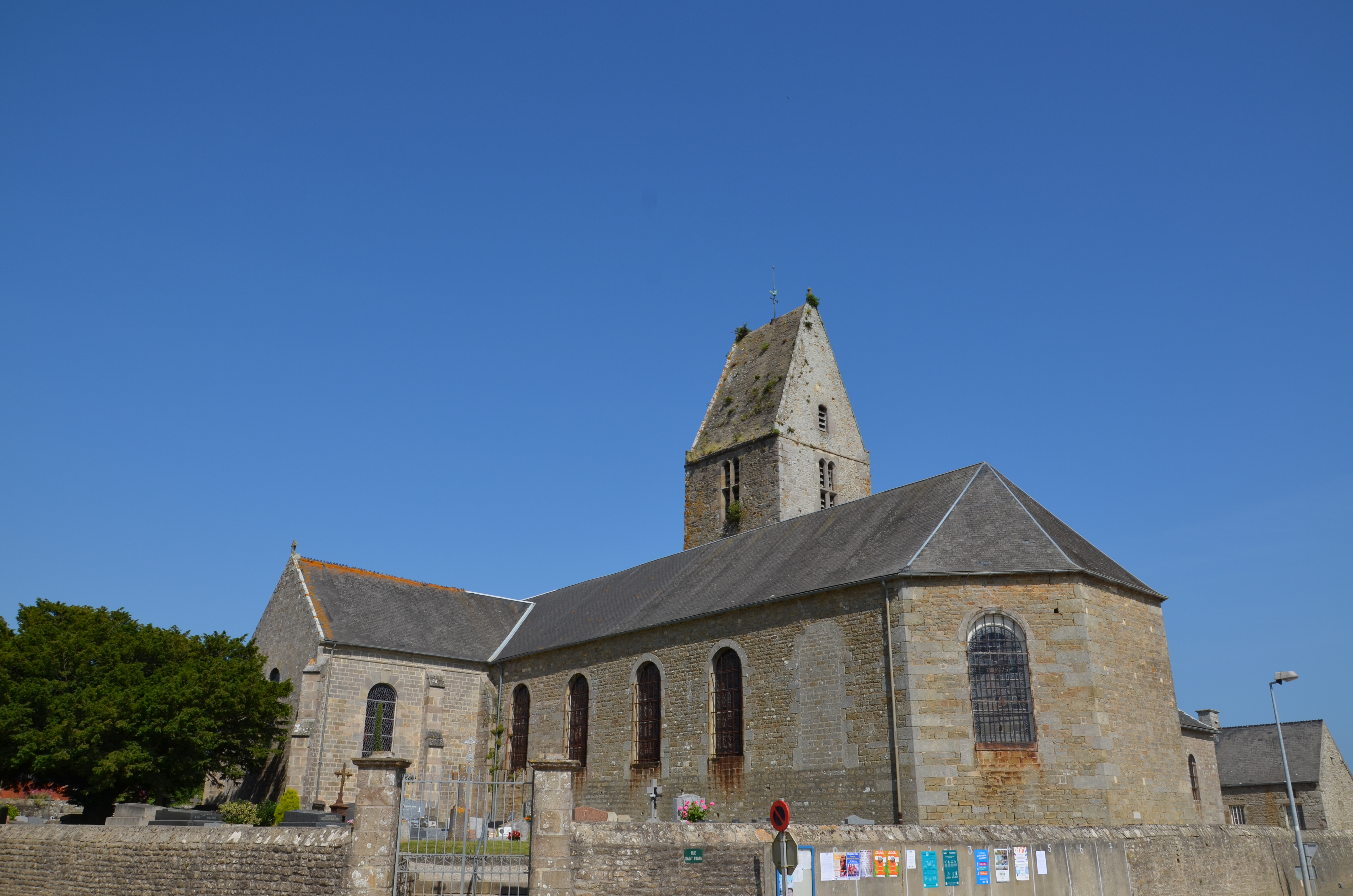 Église Notre-Dame de Valcanville.